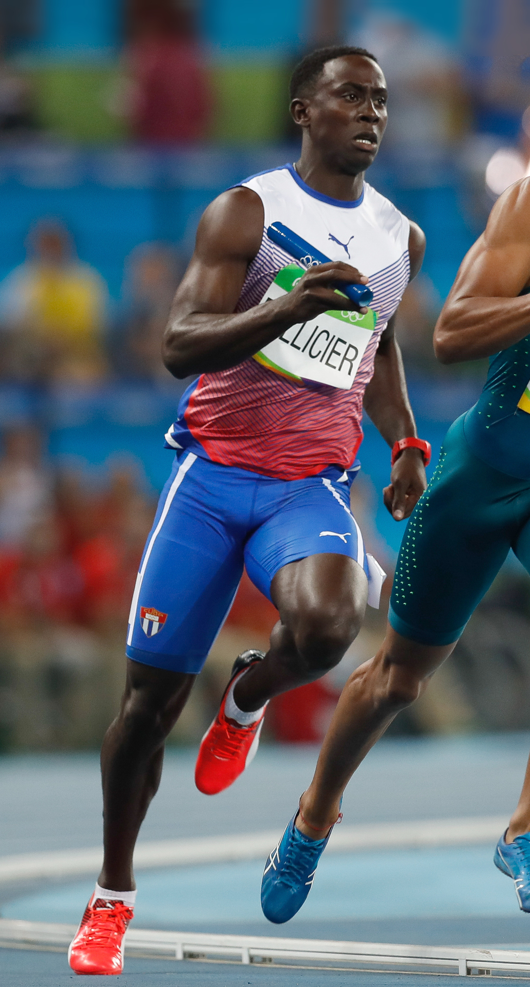 Rio de Janeiro - Eliminatórias do revezamento 4 x 400m nos Jogos Rio 2016, no Estádio Olímpico (Fernando Frazão/Agência Brasil)